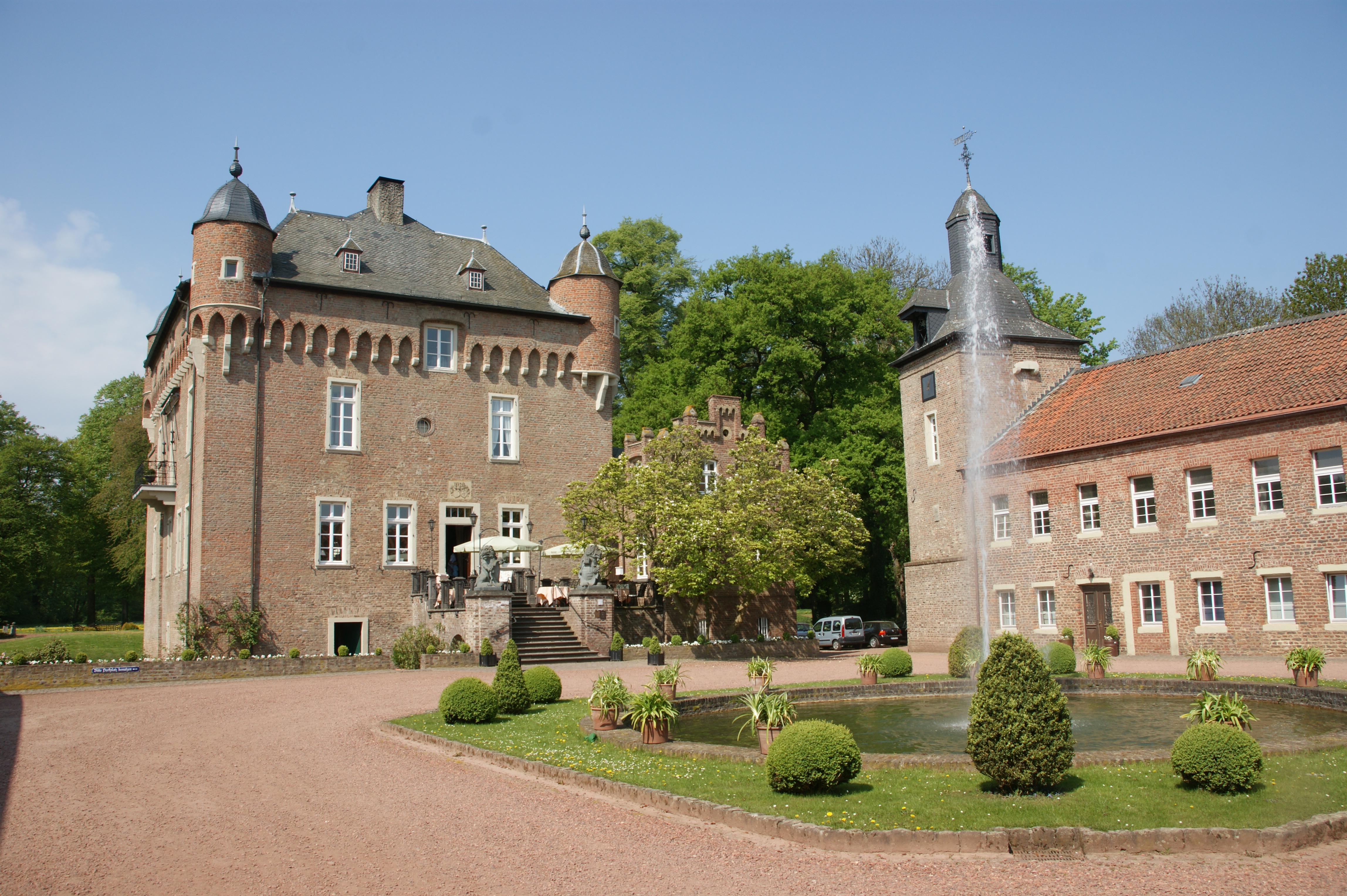 Schloss Loersfeld